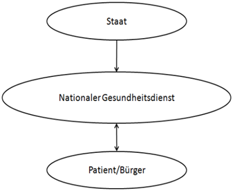 Das steuerfinanzierte Versicherungsmodell